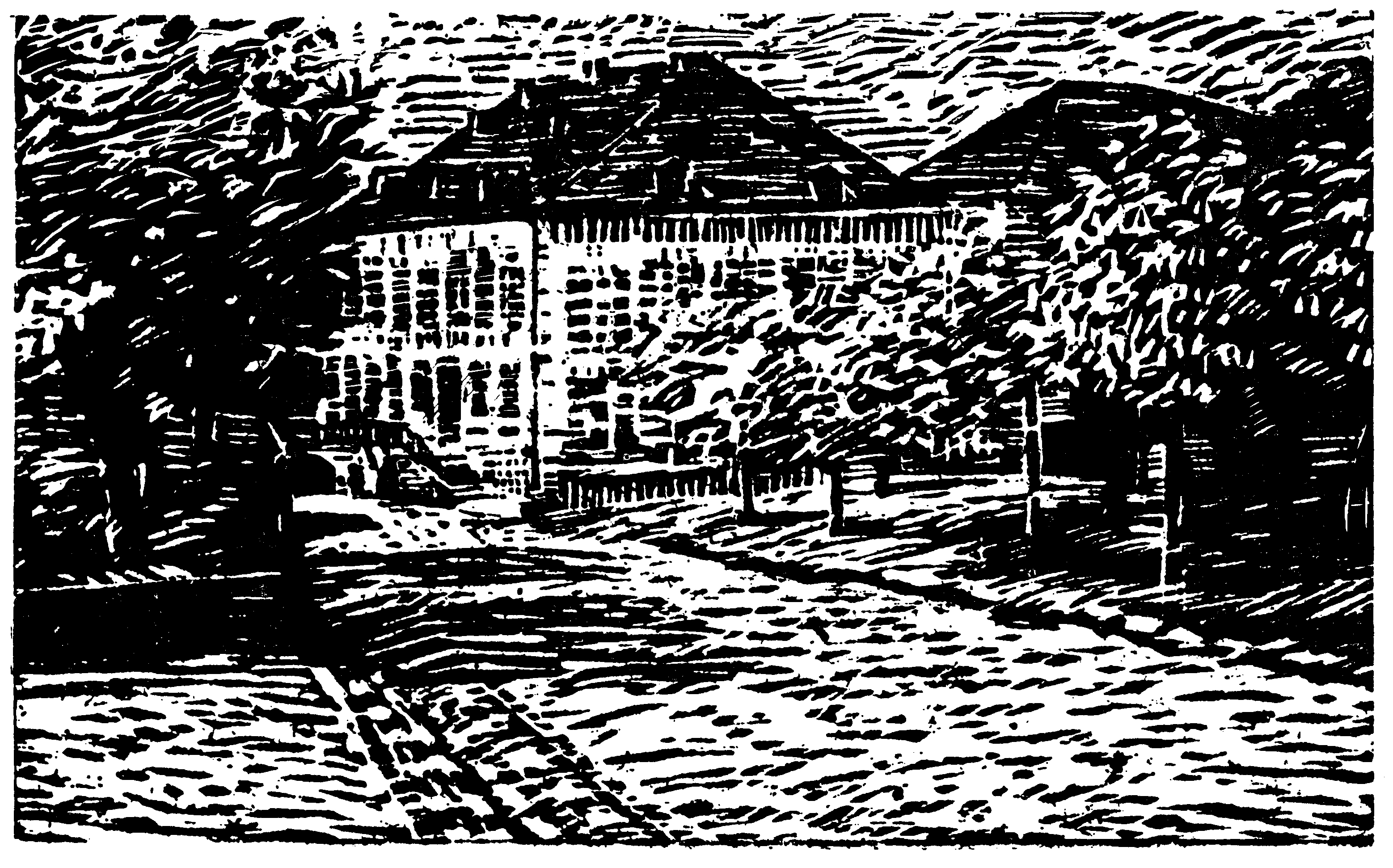 Gasthaus Fuchss, Irmenach. Holzschnitt von Friedrich Karl Ströher (1876-1925)